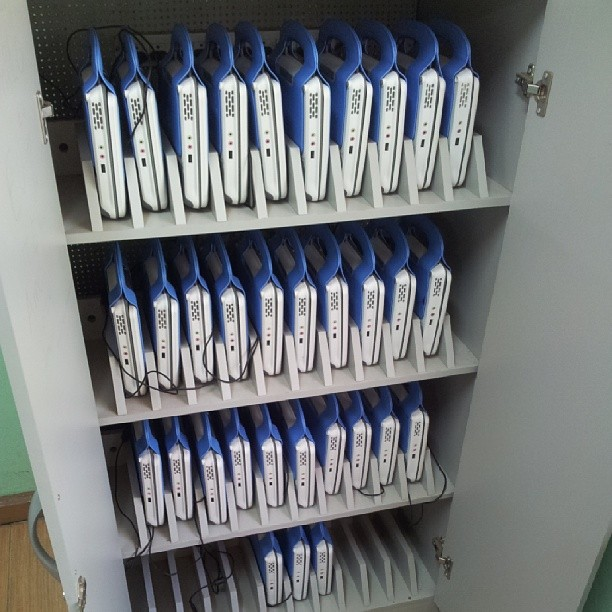 Armário contendo Laptops Classmate utilizados em sala de aula nas escolas de Piraí - RJ